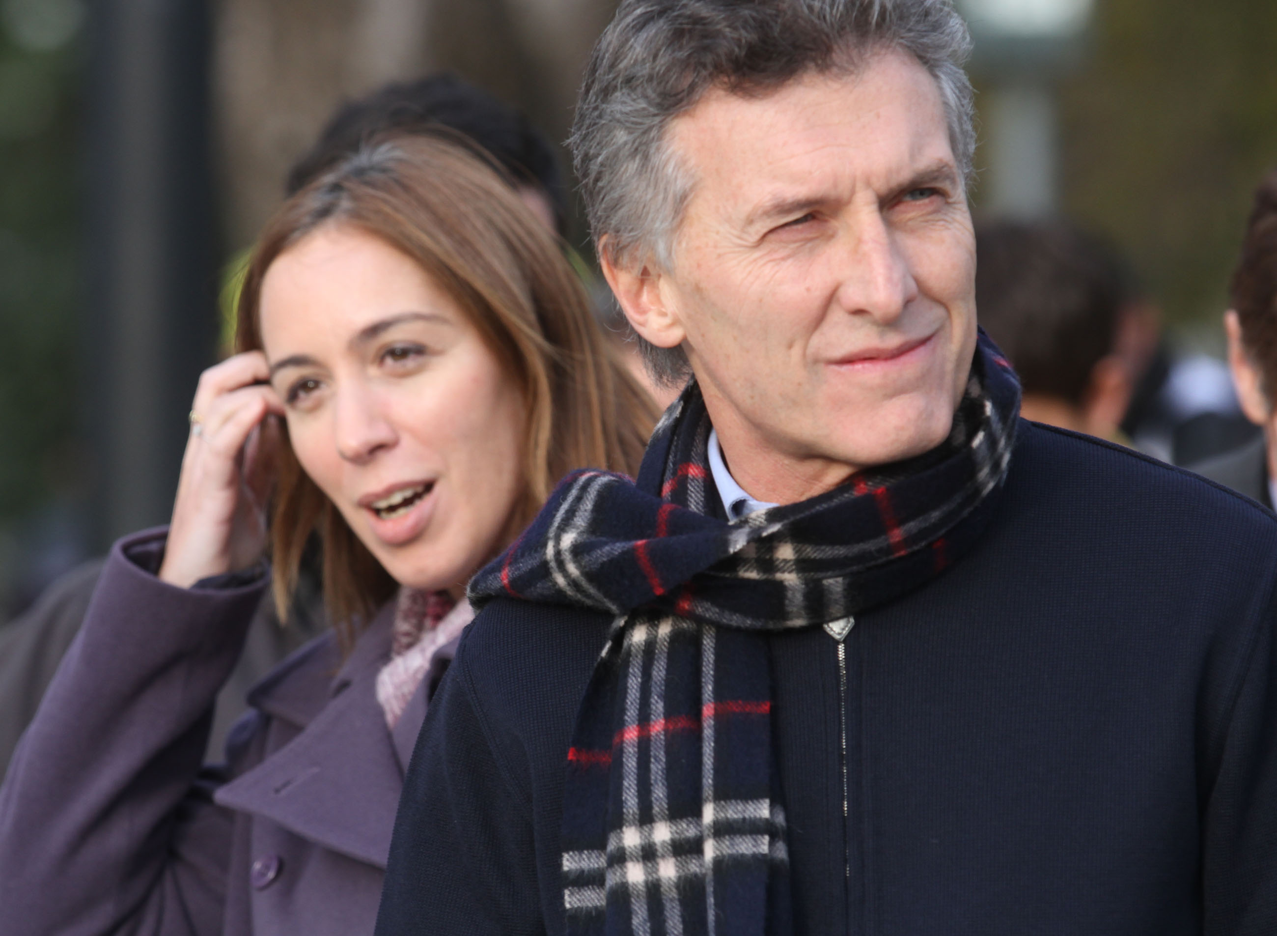 Buenos Aires. Junio 7 de 2012. El jefe de Gobierno porteño, Mauricio Macri, anunció hoy la construcción del primer Parque de Deportes Extremos de la Ciudad de Buenos Aires, que estará emplazado en la Costanera Norte y permitirá que miles de jóvenes puedan disponer de un espacio adecuado y seguro para la práctica de skates, rollers, longboard y mountain bike, entre otras disciplinas. Foto Matías Repetto-gv/GCBA.